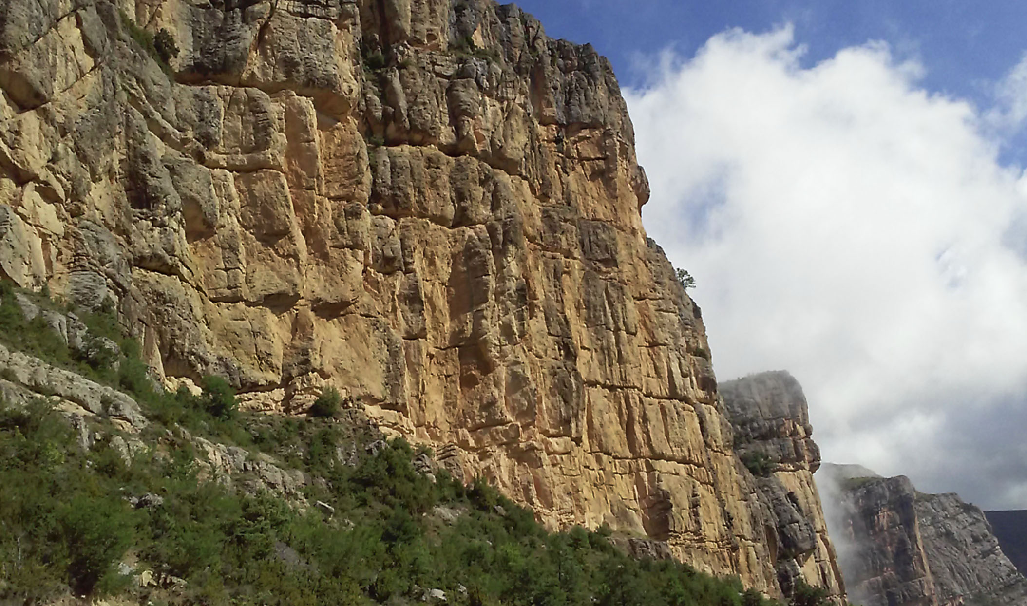 Els Cingles de la Serra de Sis (o serra del Cis) són penya-segats o espadats verticals situats al nord del Coll de Vent i al vessant oriental de la serra. Pertanyen a la Baixa Ribagorça dels Prepirineus aragonesos.